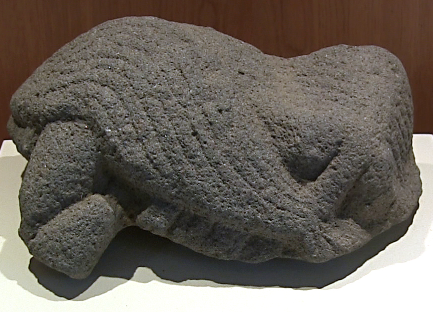 Karatepe (Asatiwataya), neo-hethitischer Fundort bei Osmaniye, Südtürkei, Fragment eines Löwenmauls, wahrscheinlich zu Portallöwe SKr 19